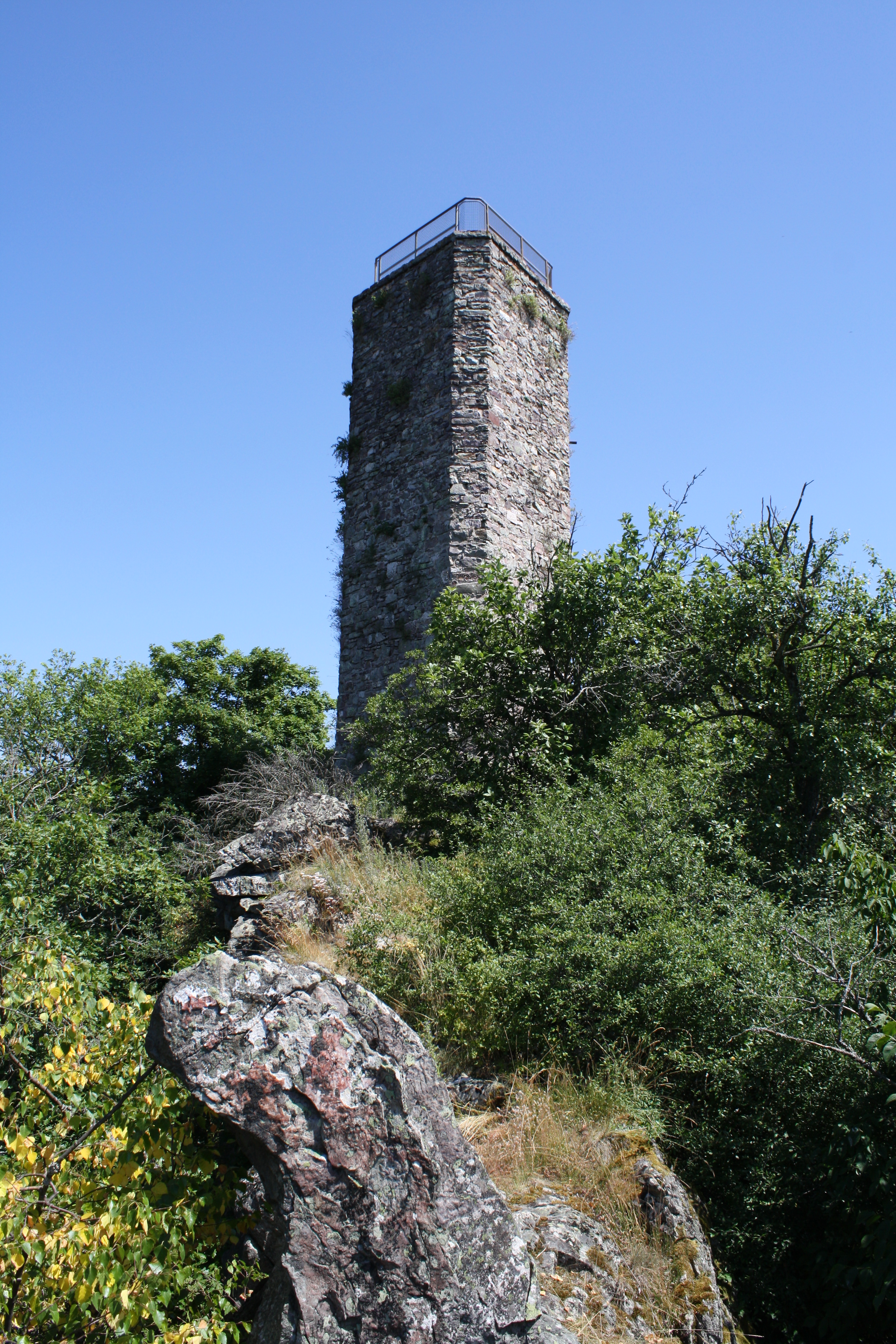 Bergfried der Burgruine Koppenstein